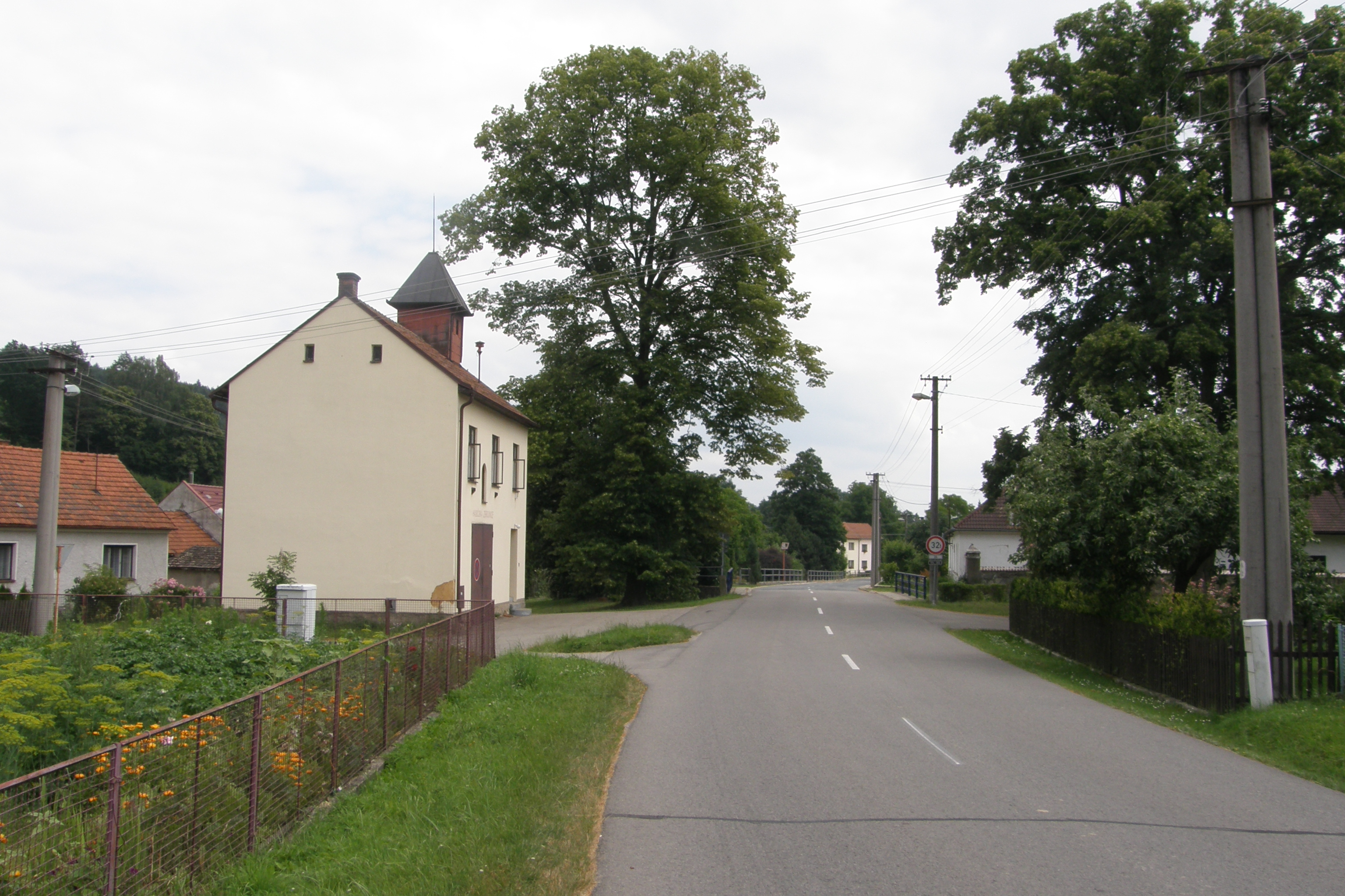 Zbraslavec